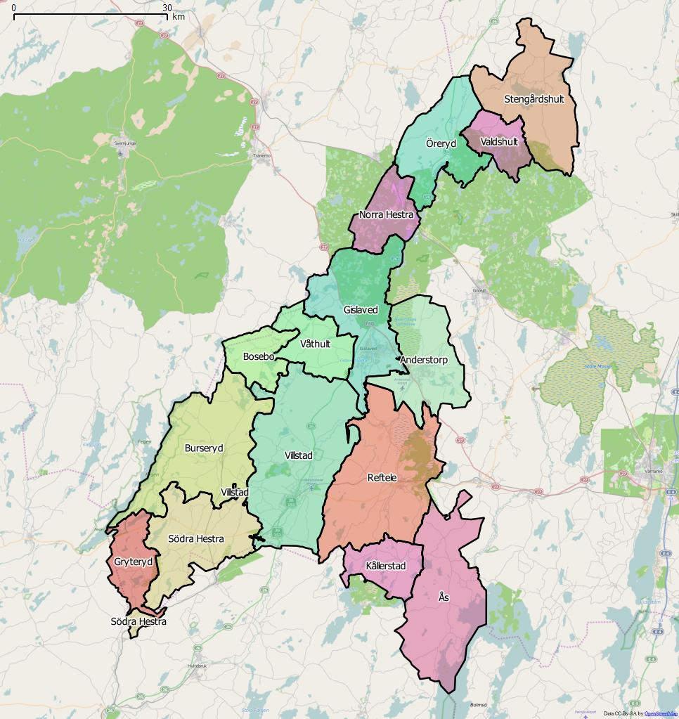 Distriktsindelningen i Gislaveds kommun